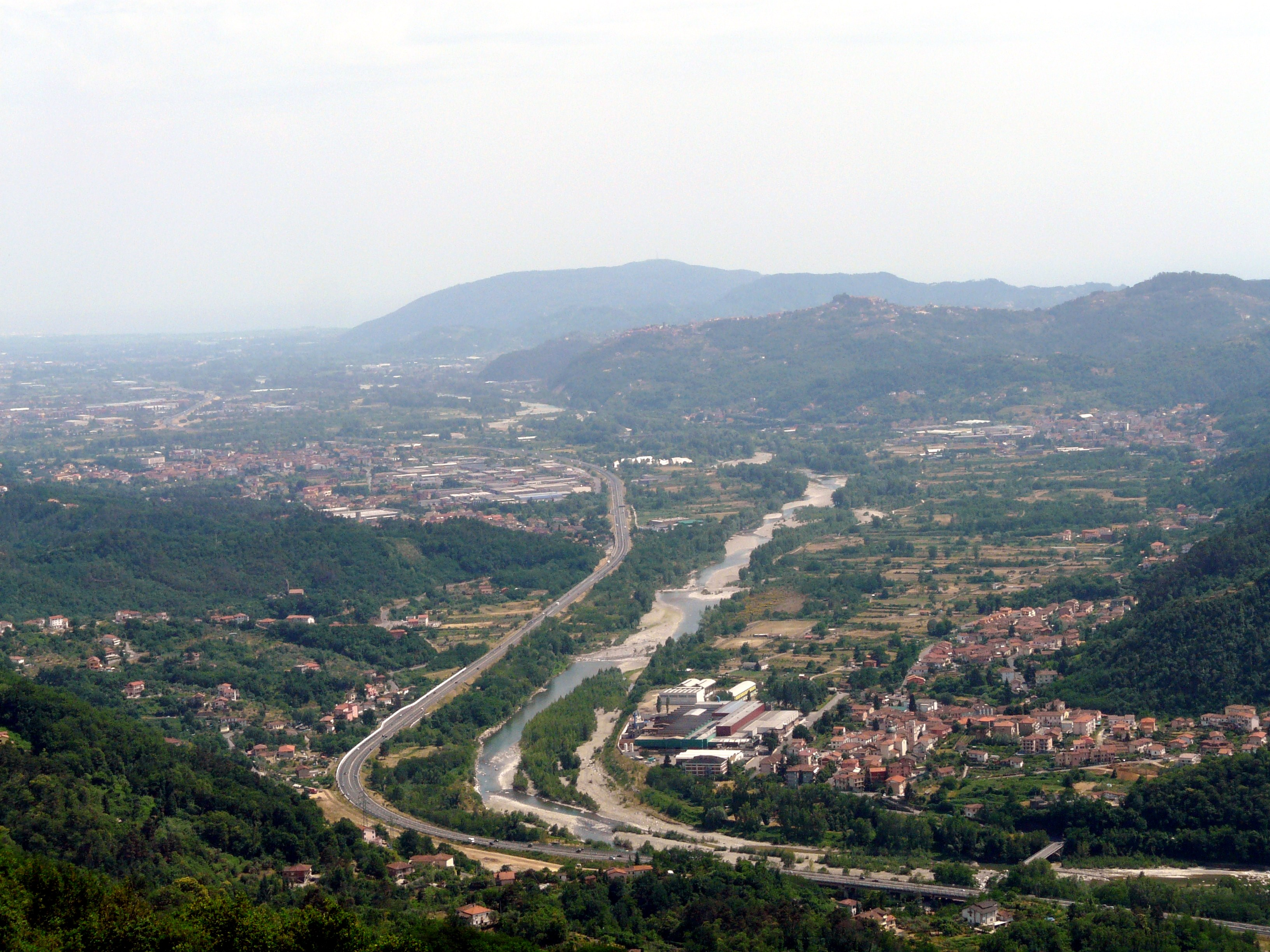 Panorama di Piana Battolla (Follo) dalla frazione di Madrignano, Calice al Cornoviglio, Liguria, Italia